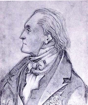 Johan Adam Cronstedt